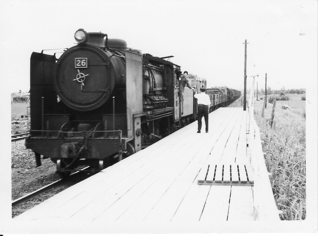 晩翠駅のプラットホーム